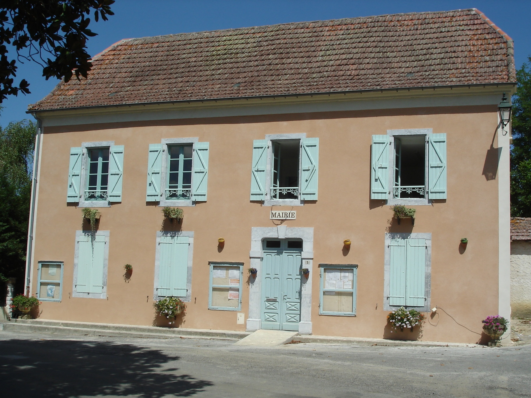 Mairie de Sombrun. Sombrun, Hautes-Pyrénées. France.